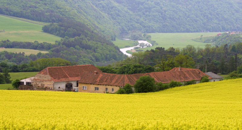 Hospodářský dvůr Dubjany s řekou Berounkou v pozadí, pohled ze silnice II/201.